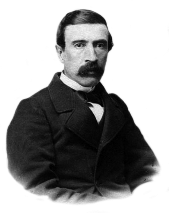 José Victorino Lastarria Santander (Rancagua, 23 de marzo de 1817 - Santiago, 14 de junio de 1888), escritor, político y revolucionario chileno.